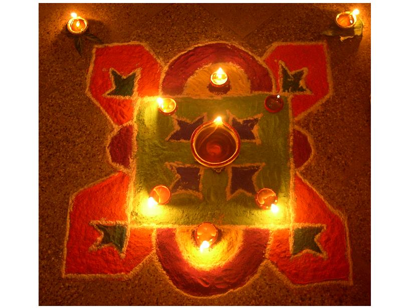 A rangoli (muggu) with lamps in Hyderabad, Andhra Pradesh.